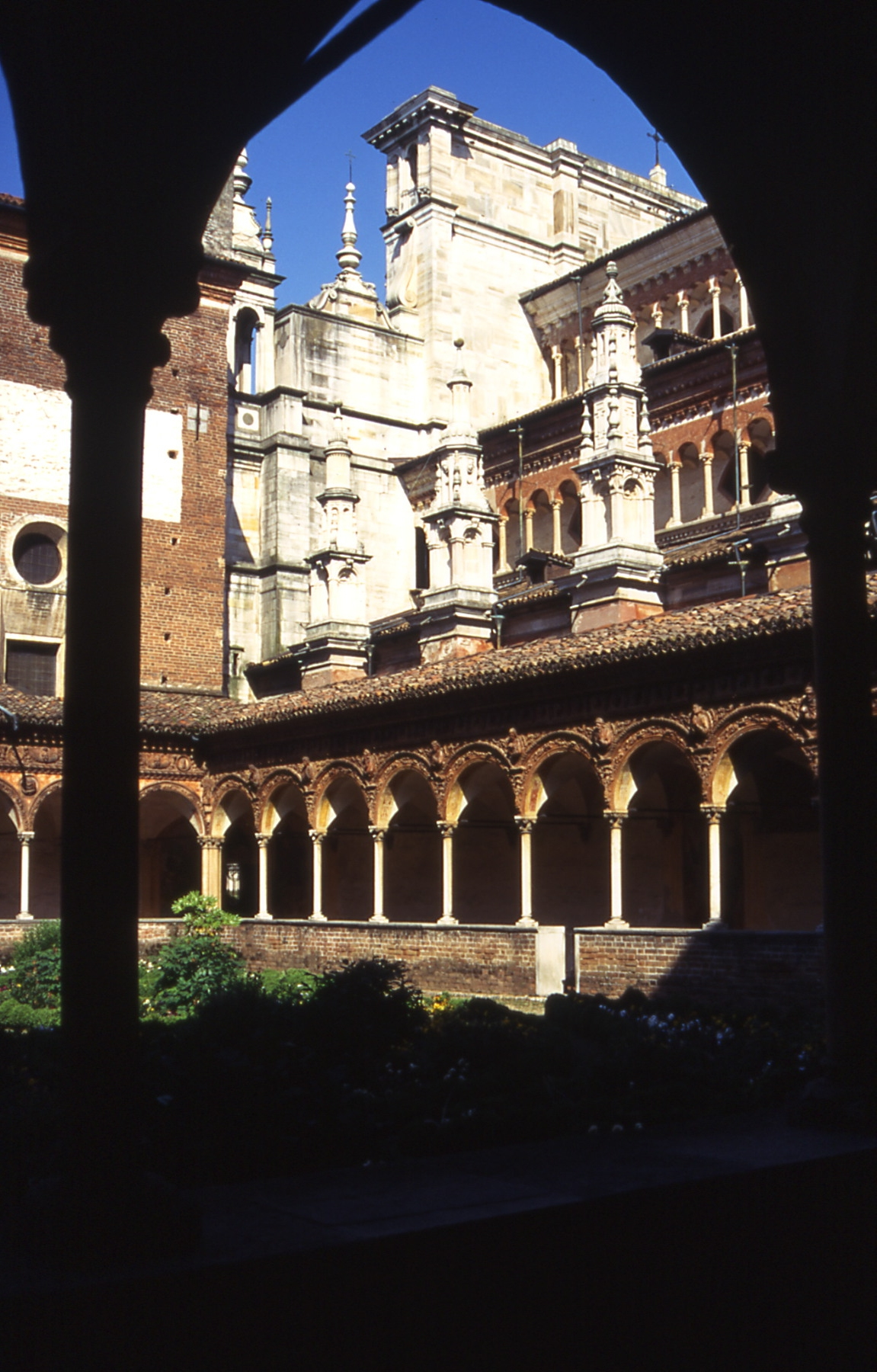 Certosa di Pavia Kreuzgang